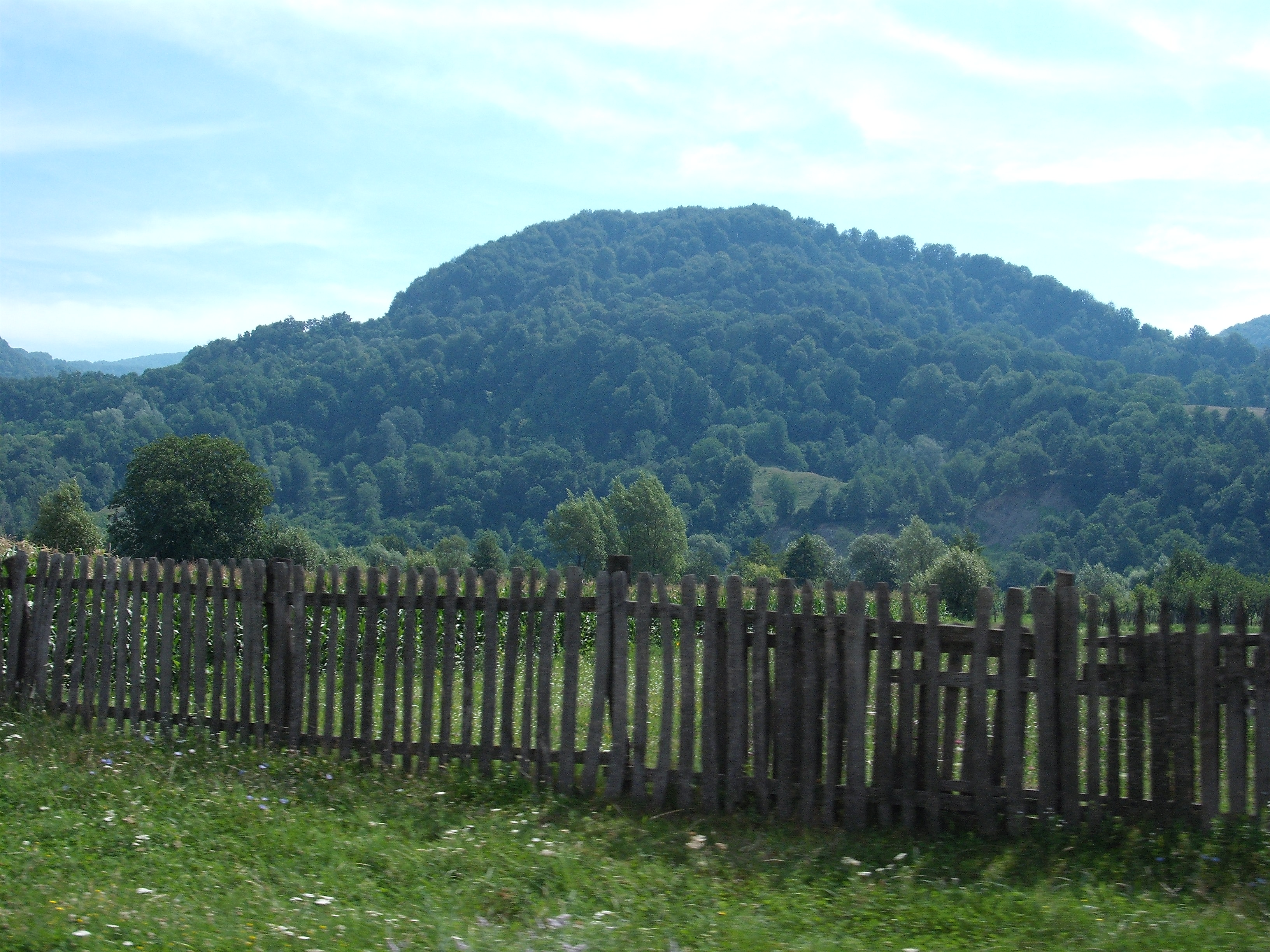 varful chiciora din subcarpatii getici de 1408m